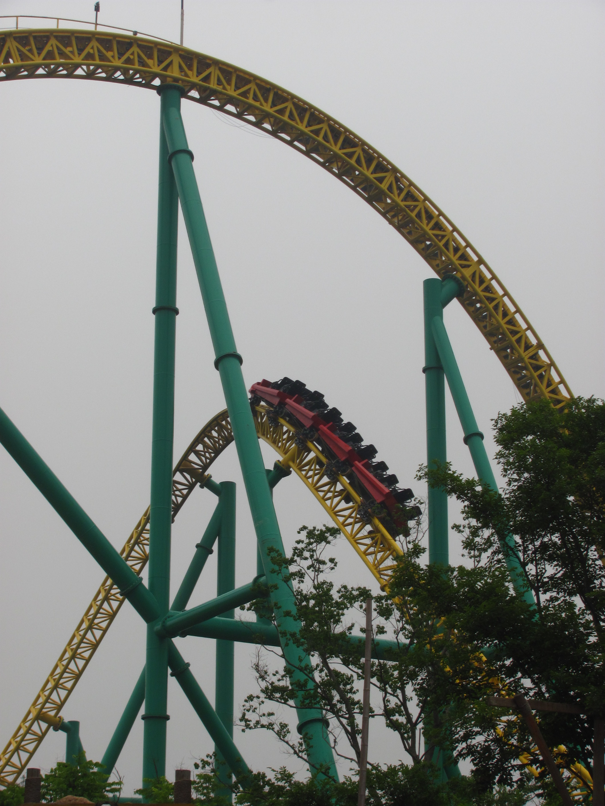 Happy Valley Shanghai